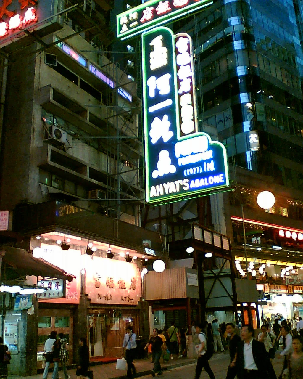 富臨飯店